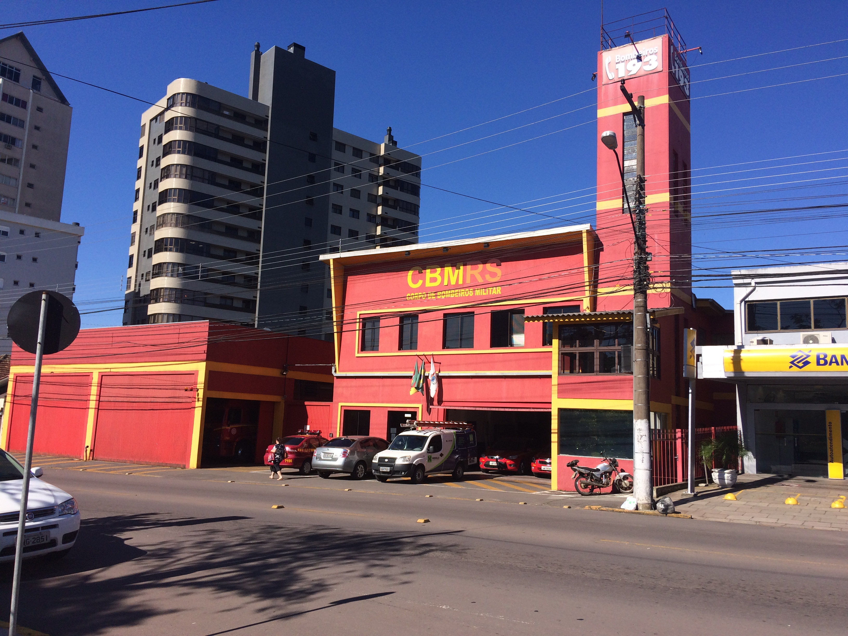 Batalhão do Corpo de Bombeiros de Bento Gonçalves